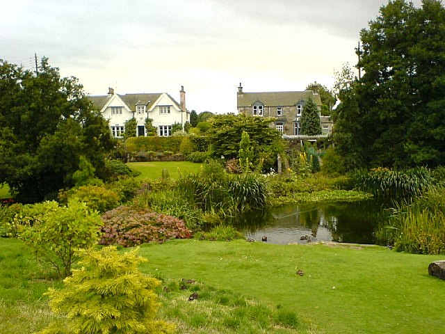 Green & gardens, behind the Glenfarg Hotel, Glenfarg